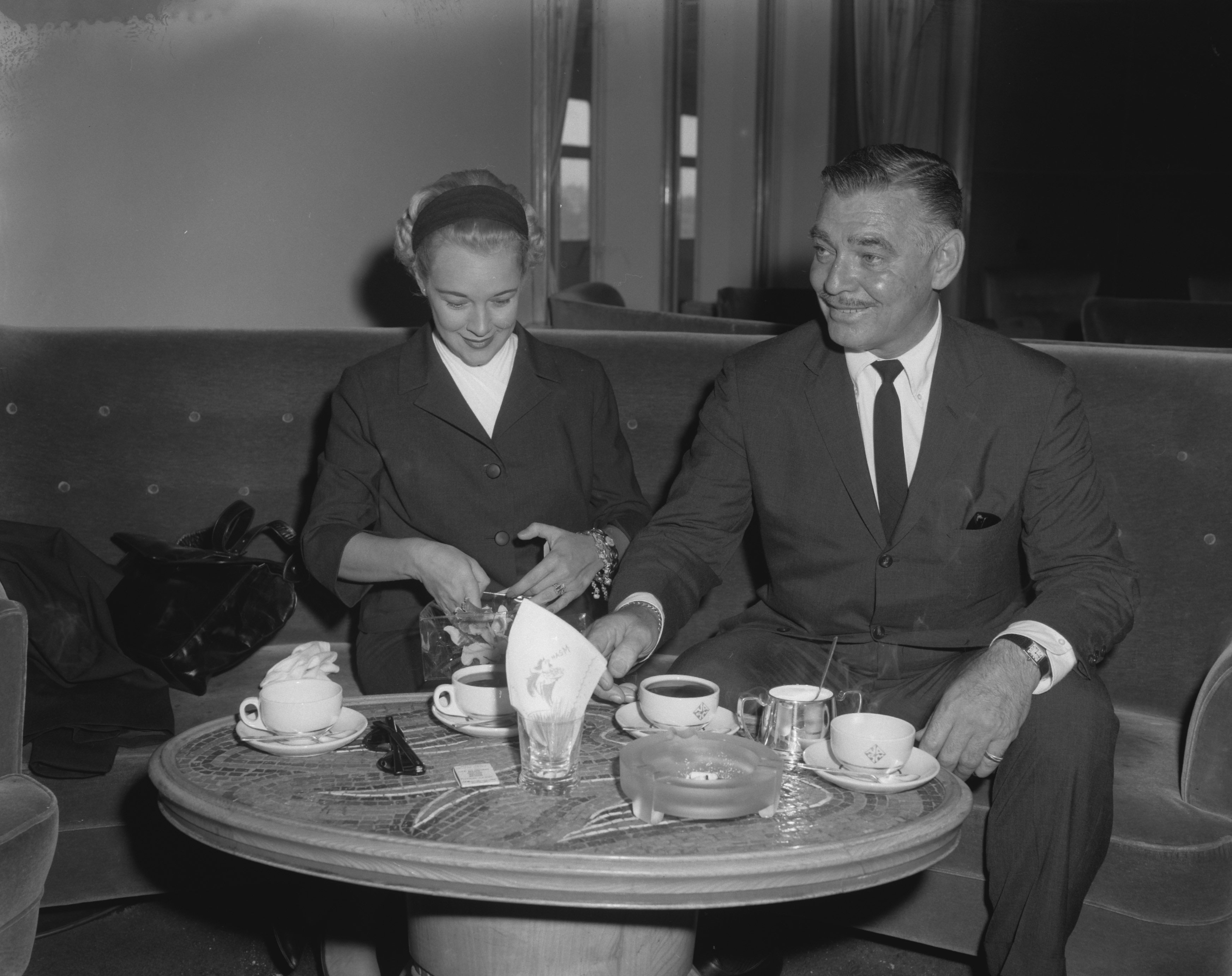 Collectie / Archief : Fotocollectie Anefo Reportage / Serie : [ onbekend ] Beschrijving : Clark Gable in Nederland, met echtgenote Kay Williams Gable Datum : 4 juli 1959 Trefwoorden : acteurs, filmsterren, gezinnen, groepsportretten Persoonsnaam : Gable Clark, Gable Kay Williams Fotograaf : Behrens, Herbert / Anefo Auteursrechthebbende : Nationaal Archief Materiaalsoort : Negatief (zwart/wit) Nummer archiefinventaris : bekijk toegang 2.24.01.04 Bestanddeelnummer : 910-4932